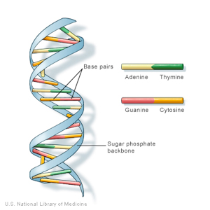 Chaine ADN synthétique